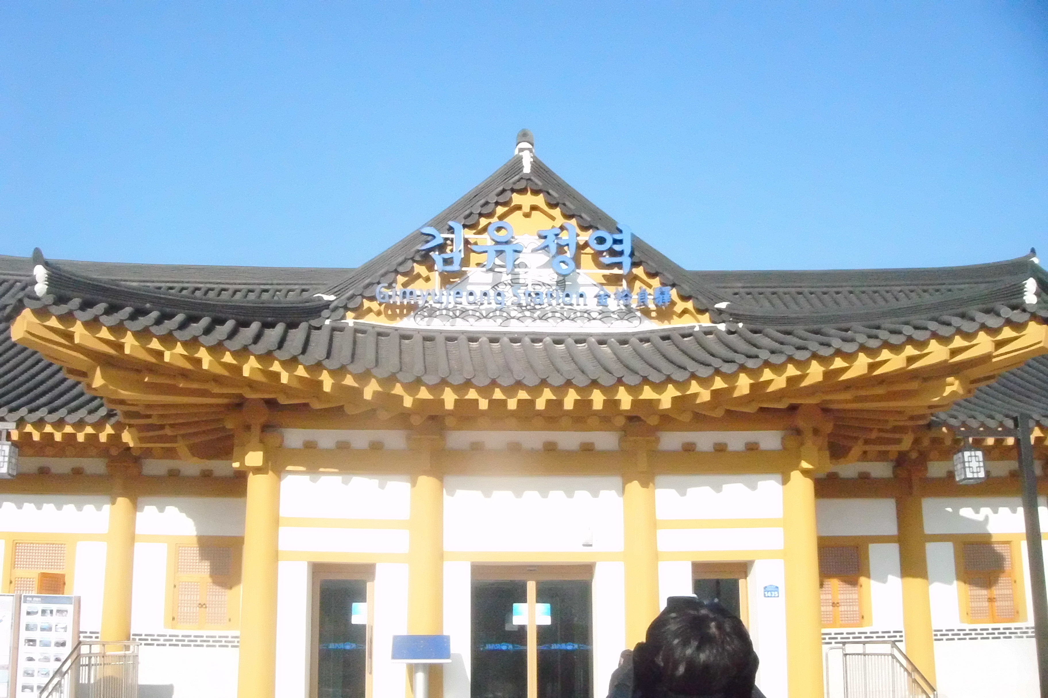 김유정역 역사